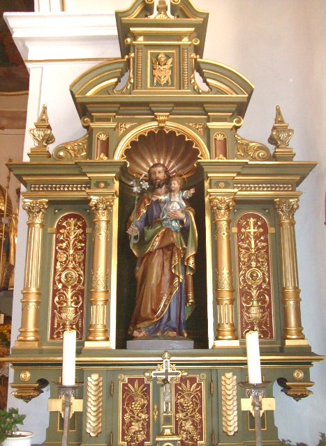 Pfarrkirche St. Nikolaus, Billafingen, Gemeinde Langenenslingen, Seitenaltar (Hl. Joseph)